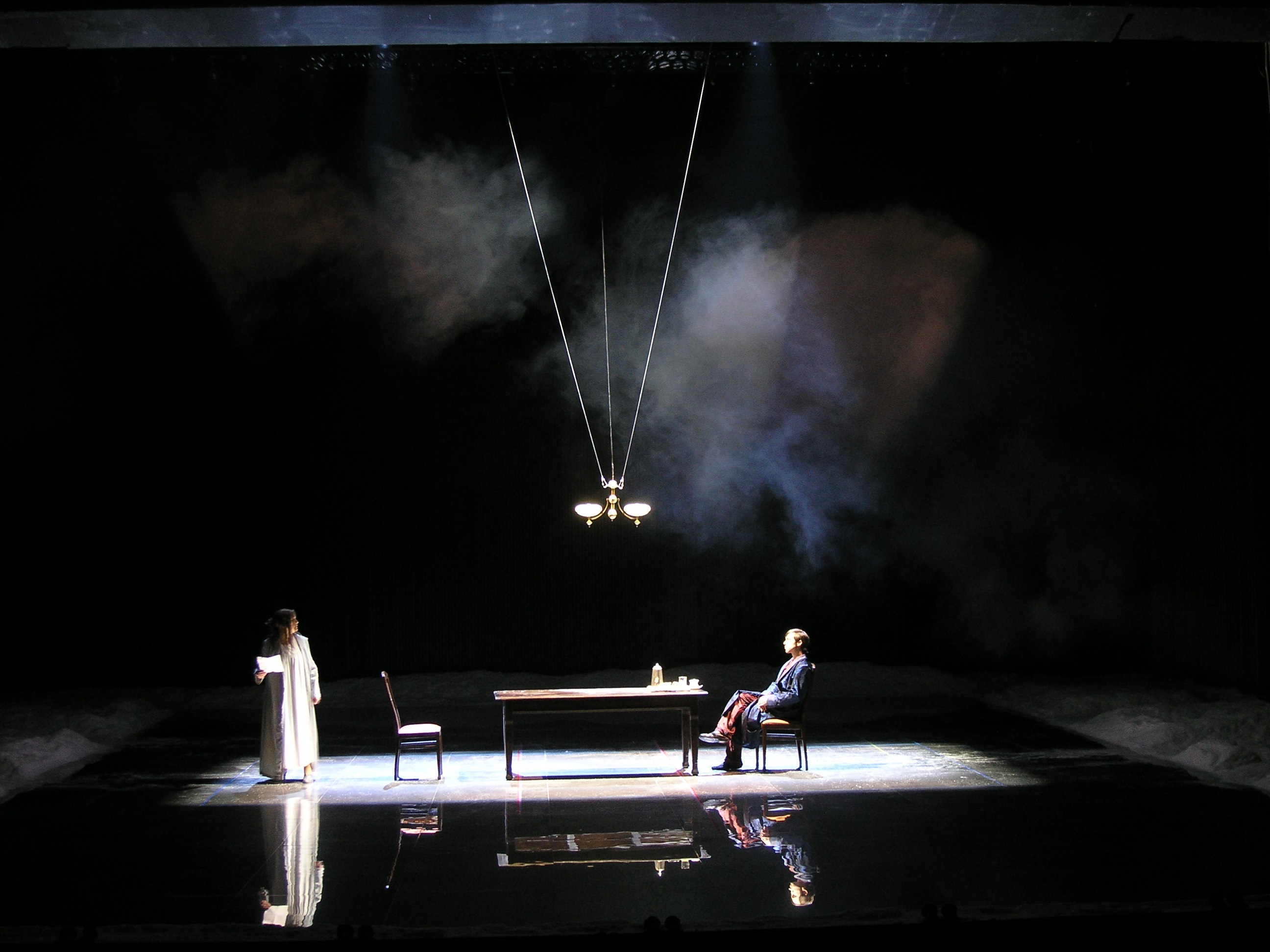 דון ז'ואן חוזר מהמלחמה, בבימויו של גדי רול, תפאורה: רוני תורן (ע"פ רעיון של מרים גורצקי).תאורה: פליס רוס, תלבושות:אגניישקה זבדובסקה, מוזיקה: אלדד לידור Teatr Polski, 2007